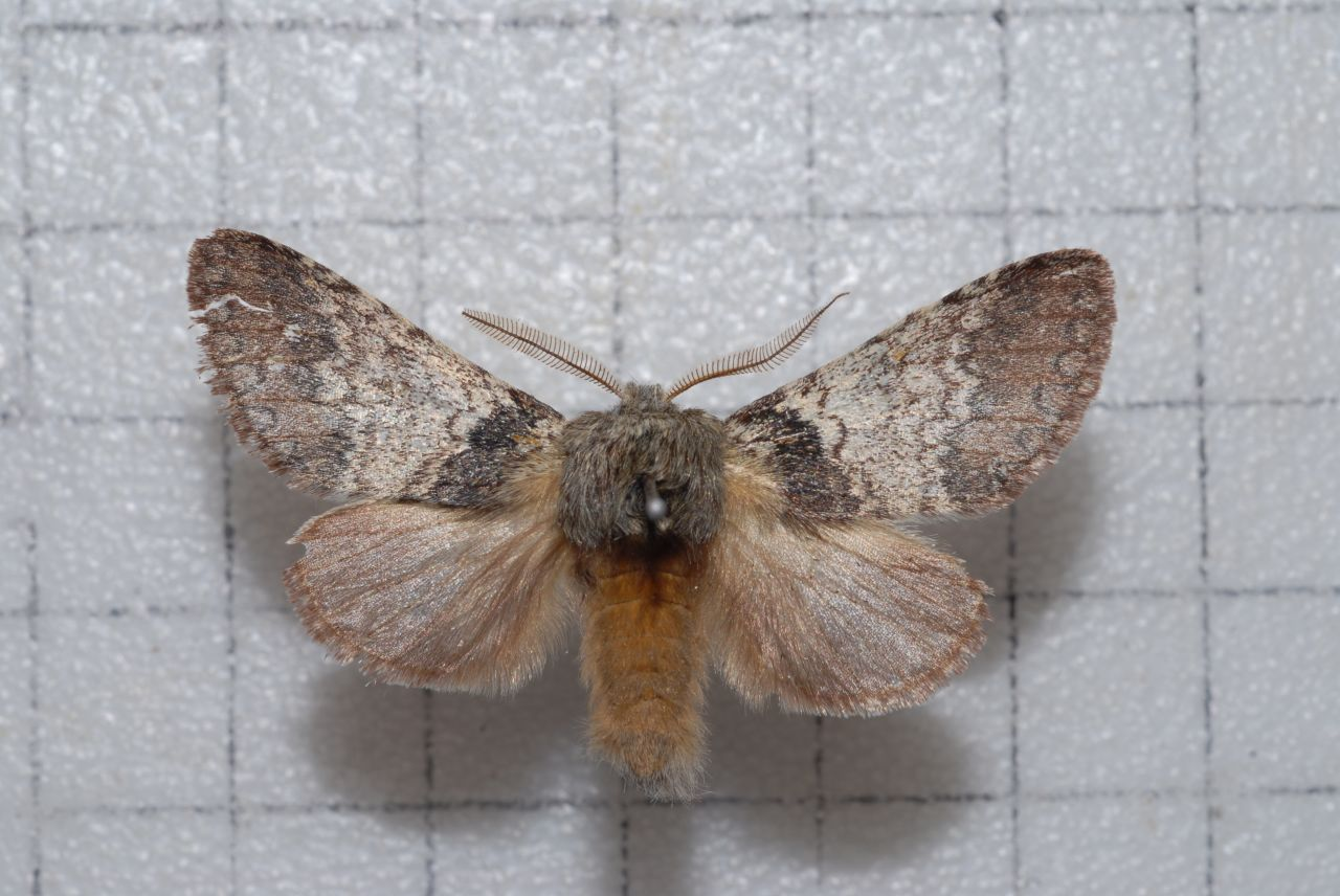 Pseudofentonia (Mimus) medioalbida (Nakamura 1973) male